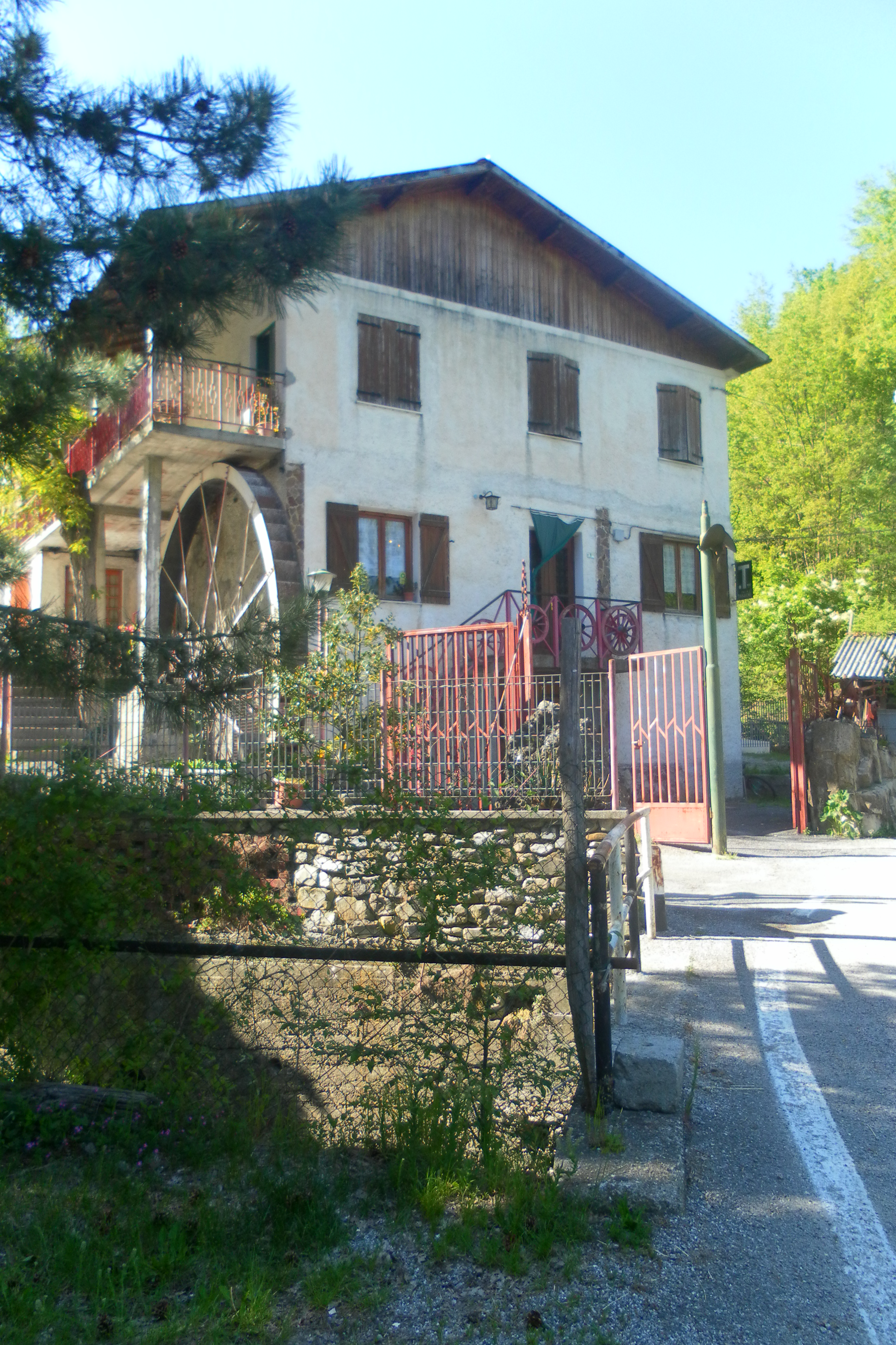 Mulino Cascè in val Vobbia a Vobbia (GE) al confine con Mongiardino Ligure (AL)